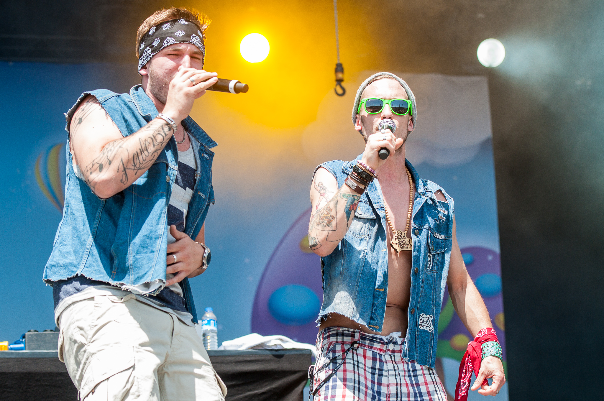 257ers,ARGO-Konzerte,Centerstage,Konzert,Livekonzert,Livemusik,Musik,RiP,Rock im Park 2014